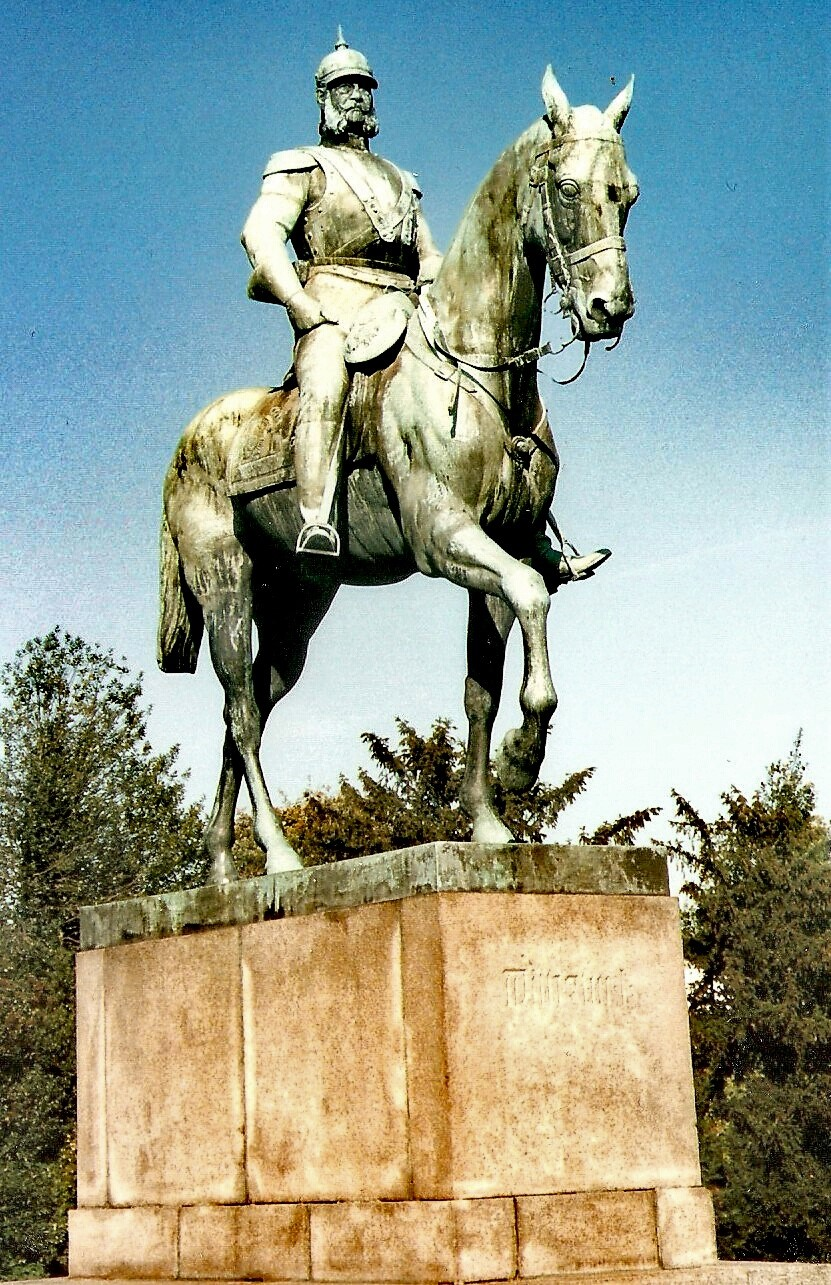 Ehrenmal Kaiser Wilhelm I. von Louis Tuaillon (1862-1919) aus dem Jahre 1917